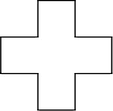 朝鮮傳統棋類之一